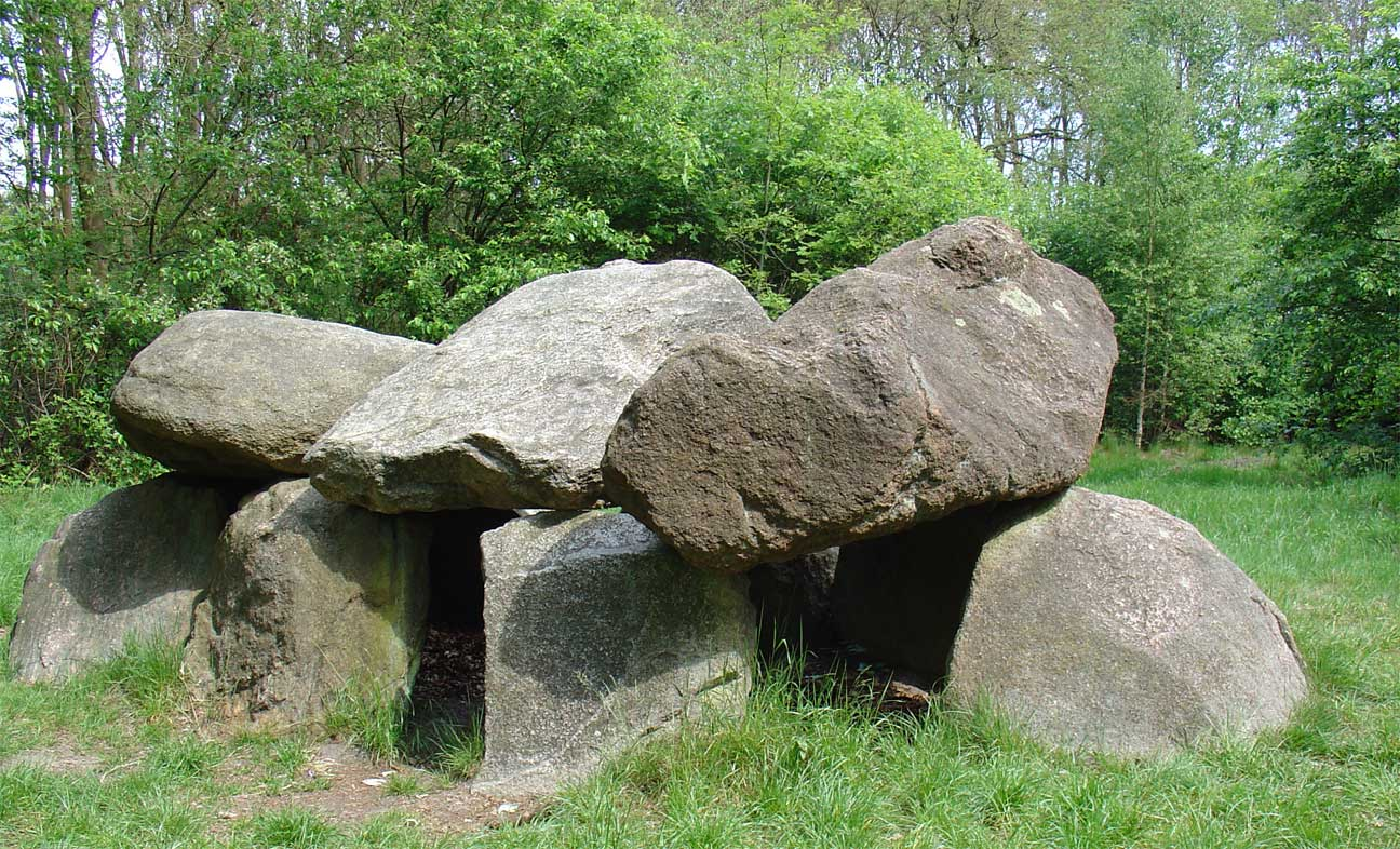 Hunebed D6 bij Tynaarlo